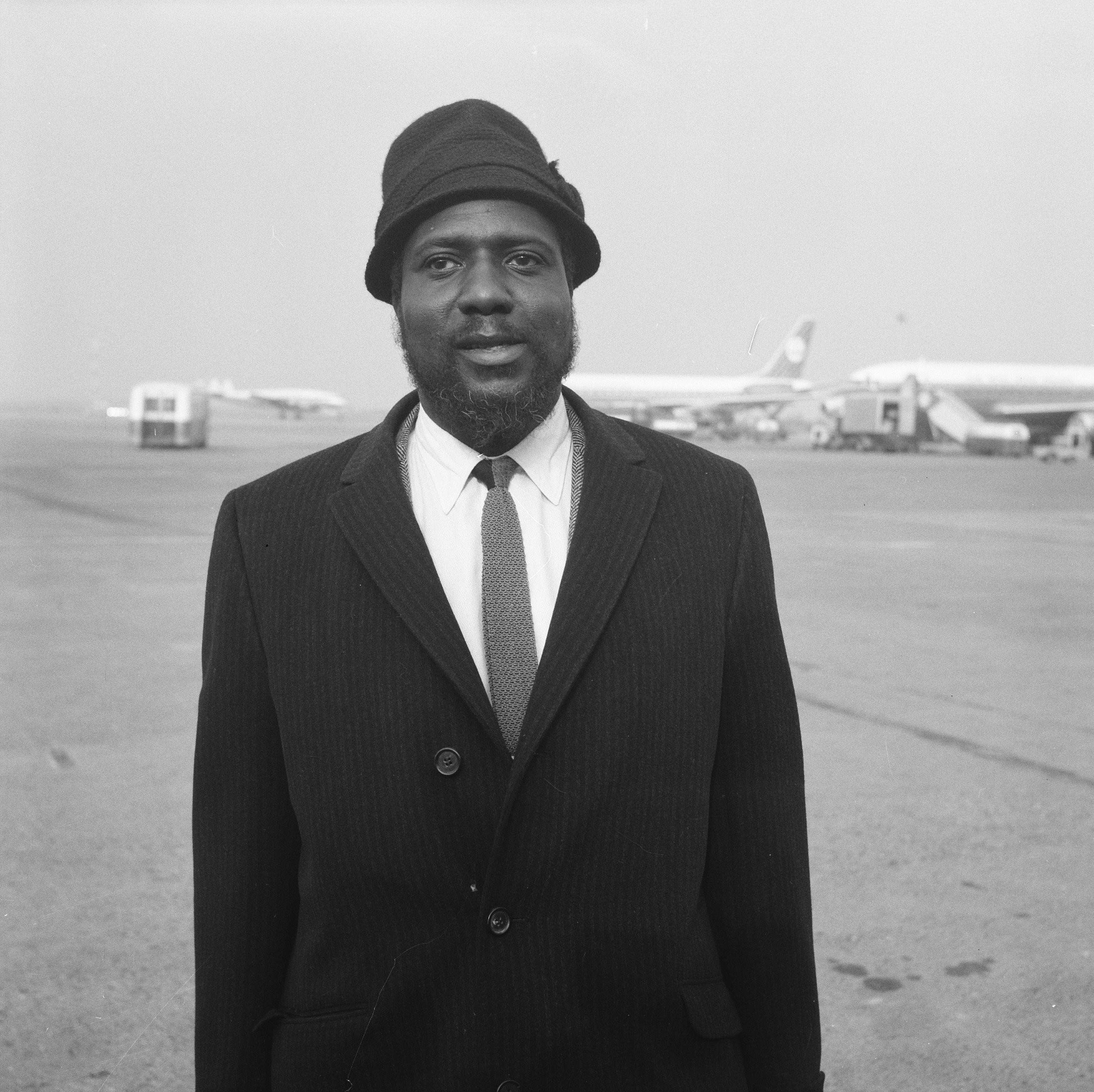 Collectie / Archief : Fotocollectie Anefo Reportage / Serie : [ onbekend ] Beschrijving : Thelonious Monk (jazzpianist) (Kop) gaf nachtconcert in Concertgebouw te Amsterdam Datum : 14 februari 1964 Locatie : Amsterdam, Noord-Holland Trefwoorden : CONCERTGEBOUWEN, Nachtconcerten Persoonsnaam : Monk, Thelonious Fotograaf : Nijs, Jac. de / Anefo Auteursrechthebbende : Nationaal Archief Materiaalsoort : Negatief (zwart/wit) Nummer archiefinventaris : bekijk toegang 2.24.01.03 Bestanddeelnummer : 916-0544